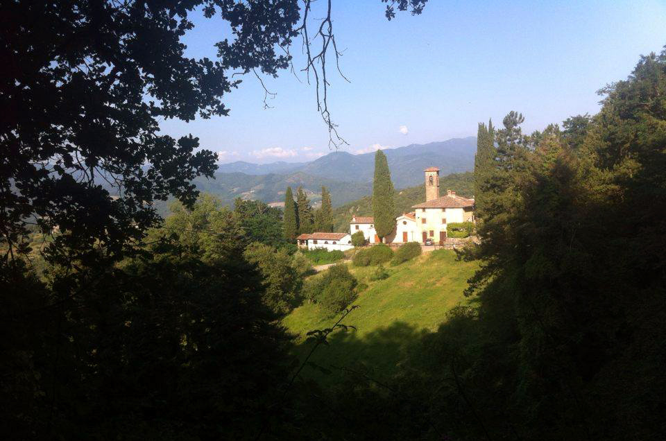 Chiesa di Sant'Andrea a Barbiana (Vicchio)